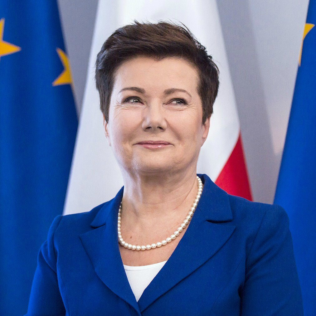 Hanna Gronkiewicz-Waltz, prezydent Warszawy. Fot. Ewelina Lach.